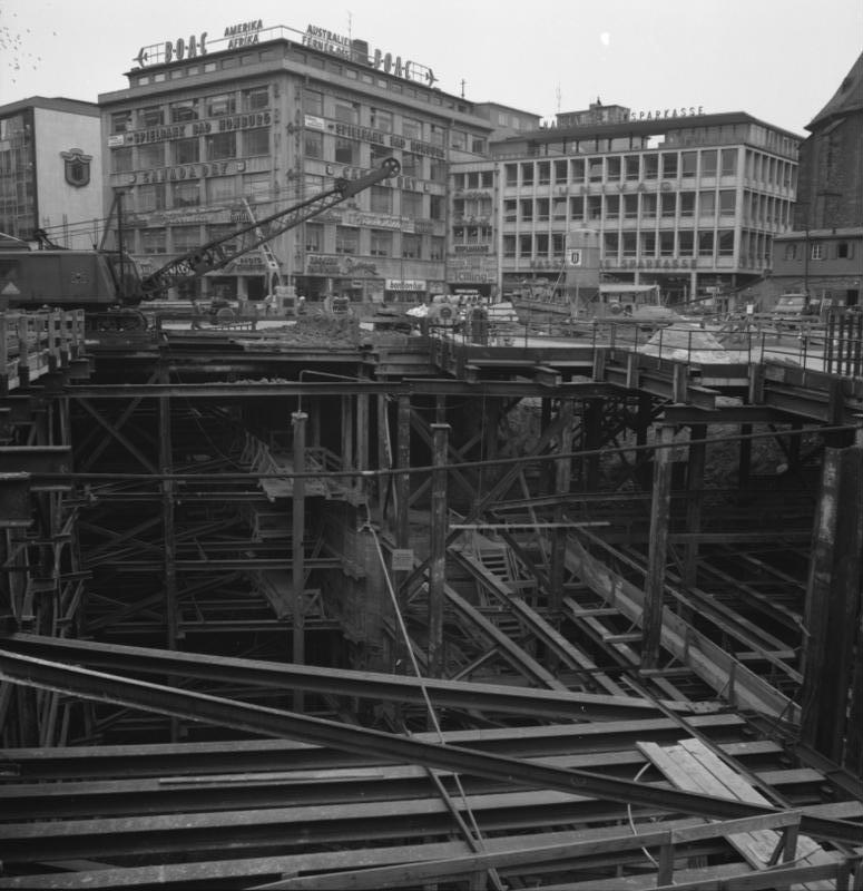 Frankfurt am Main U-Bahn-Bau